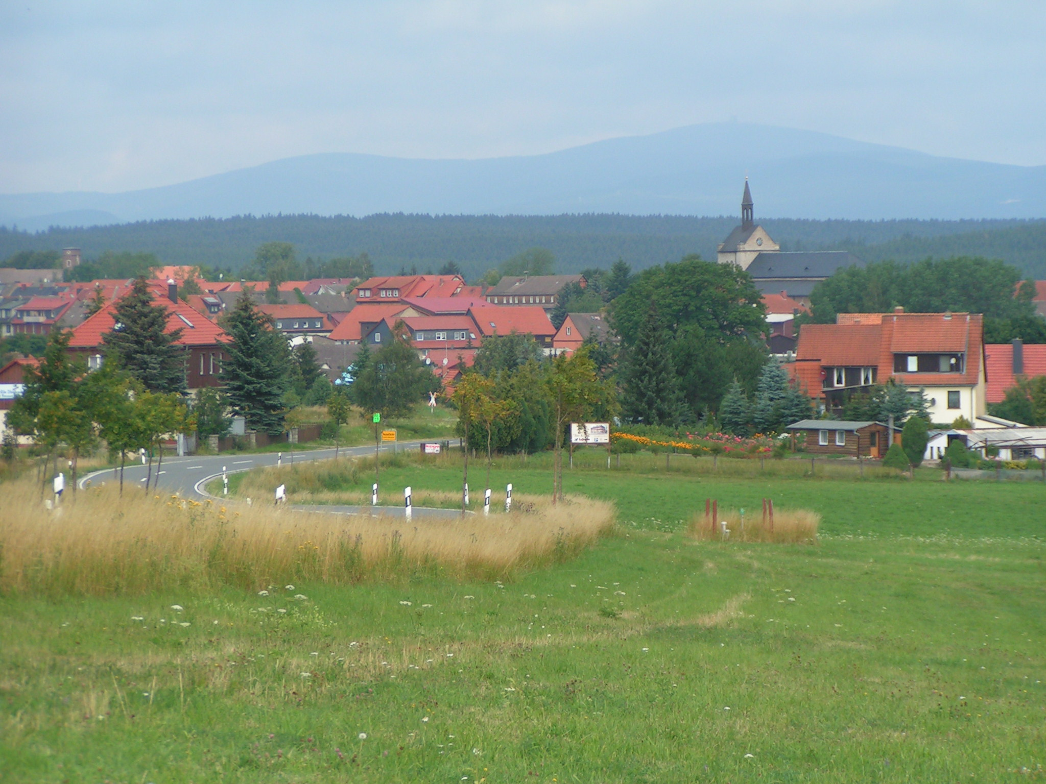 Hasselfelde. Im Hintergrund der Brocken